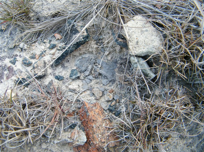 达濠小望山山顶散布的夹砂陶片，可能是新石器时代遗物。到目前为止（2010.10.18）尚未得到保护。